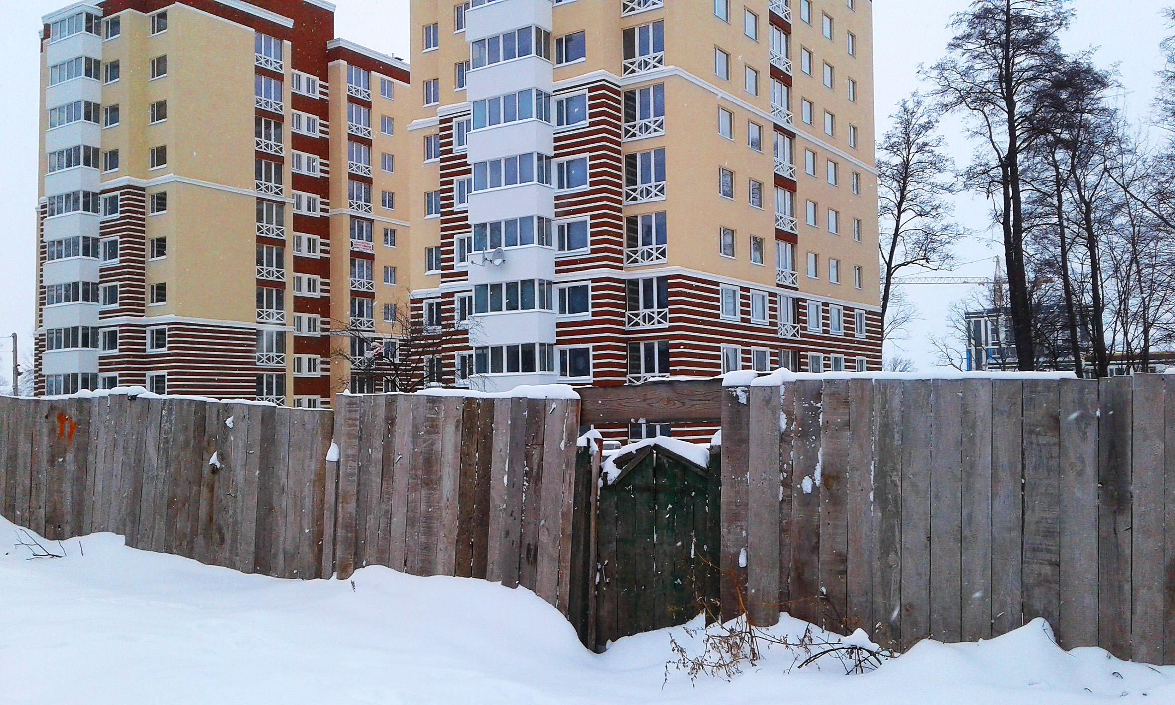 ЖК "Прованс". Урочище Пилипів Потік. Ірпінь